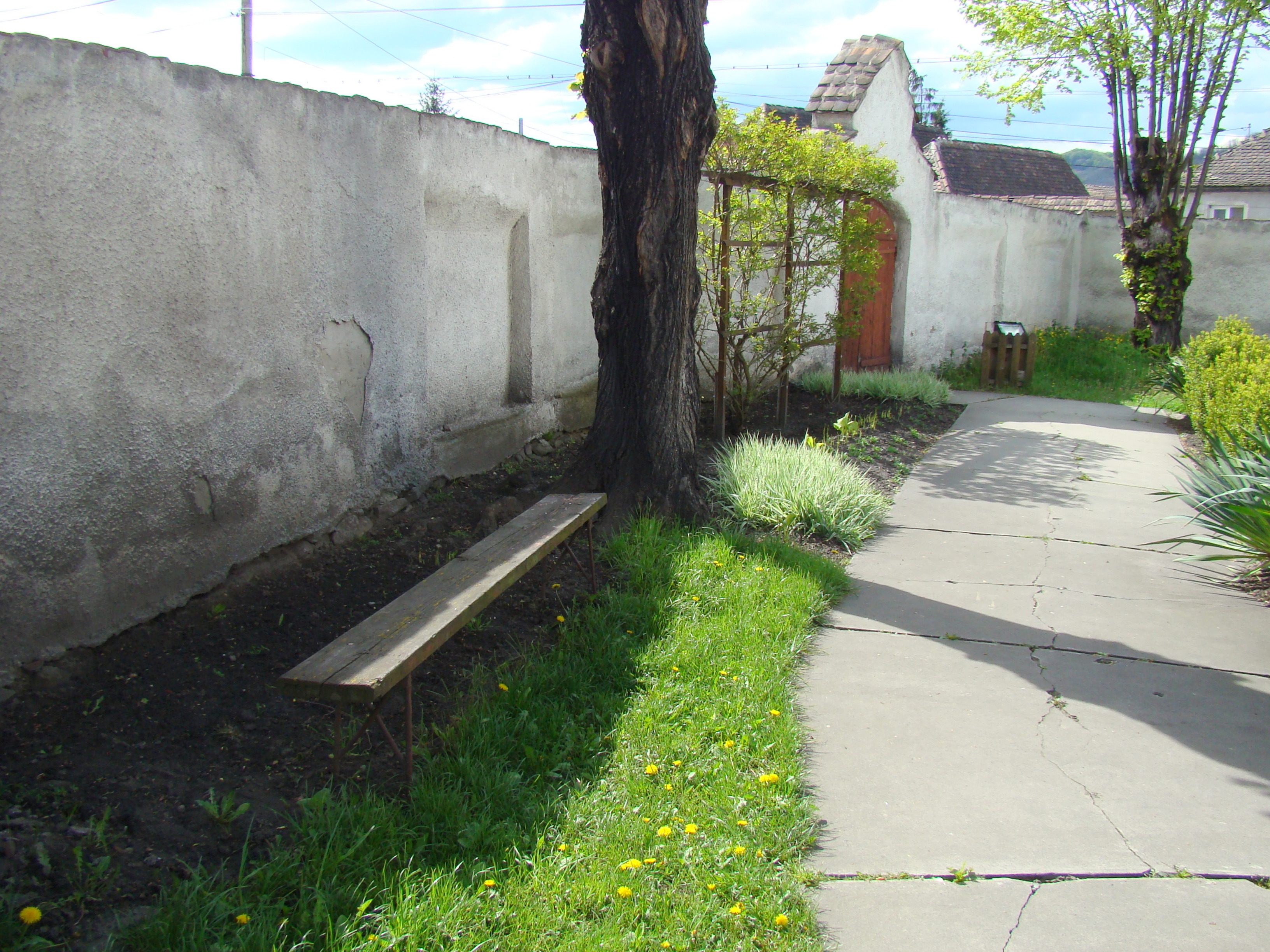 Zid-incintă,biserica evanghelică, oraș Copșa Mică, str. Mediașului 100 02